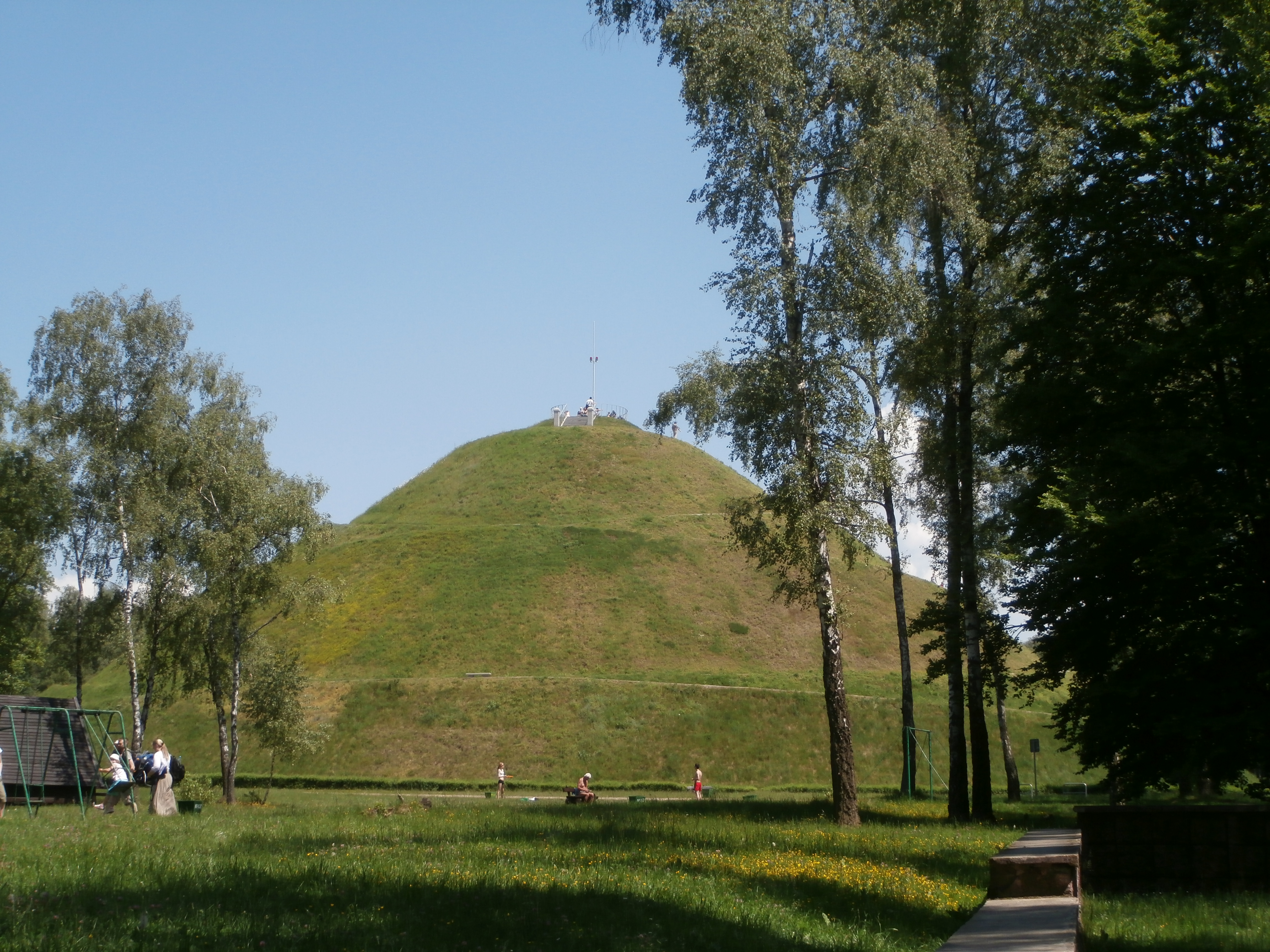 Kopiec Józefa Piłsudskiego na wzgórzu Sowiniec w Krakowie.